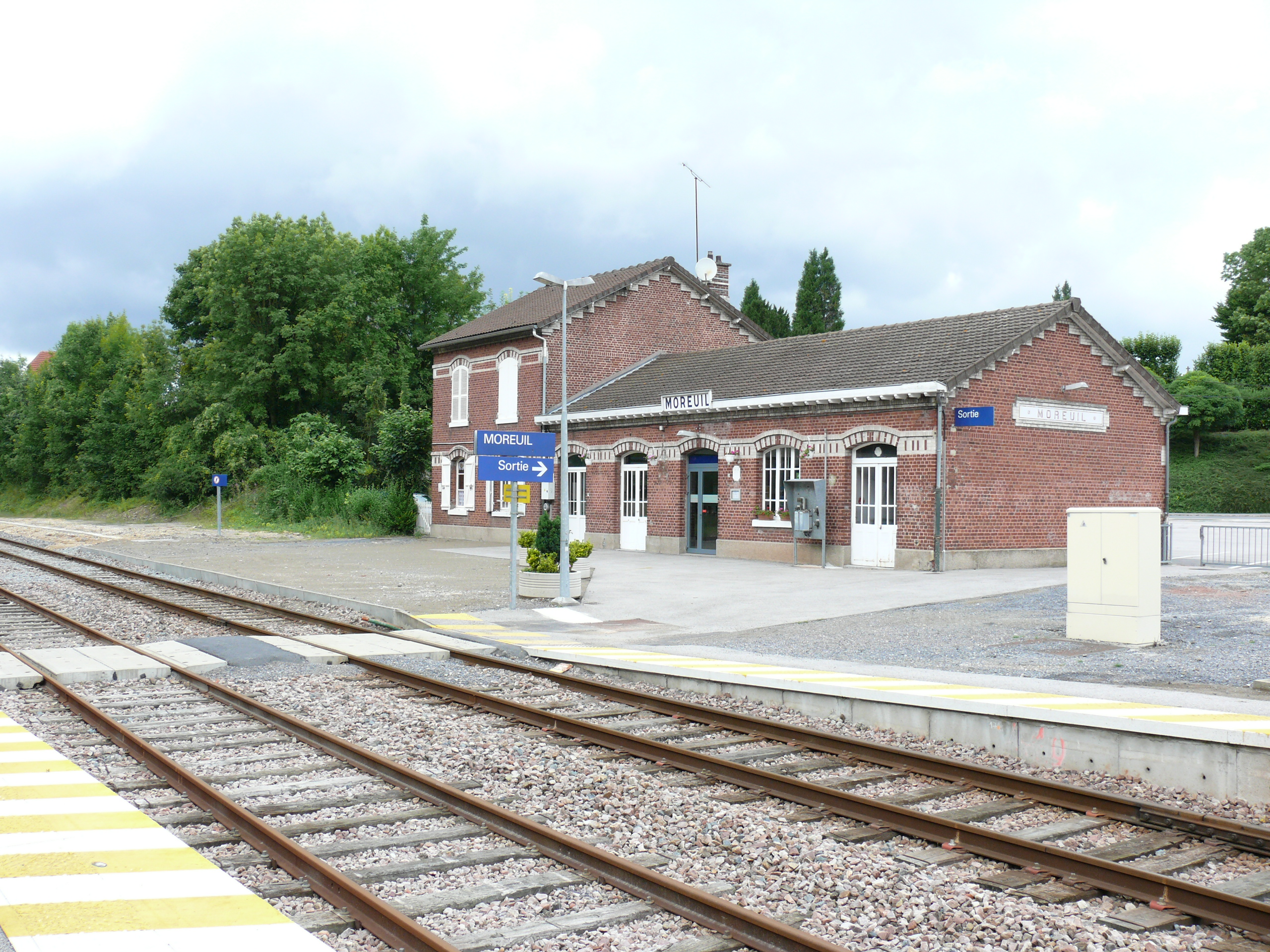 Gare de Moreuil (Ligne Amiens - Compiègne), vue depuis les voies